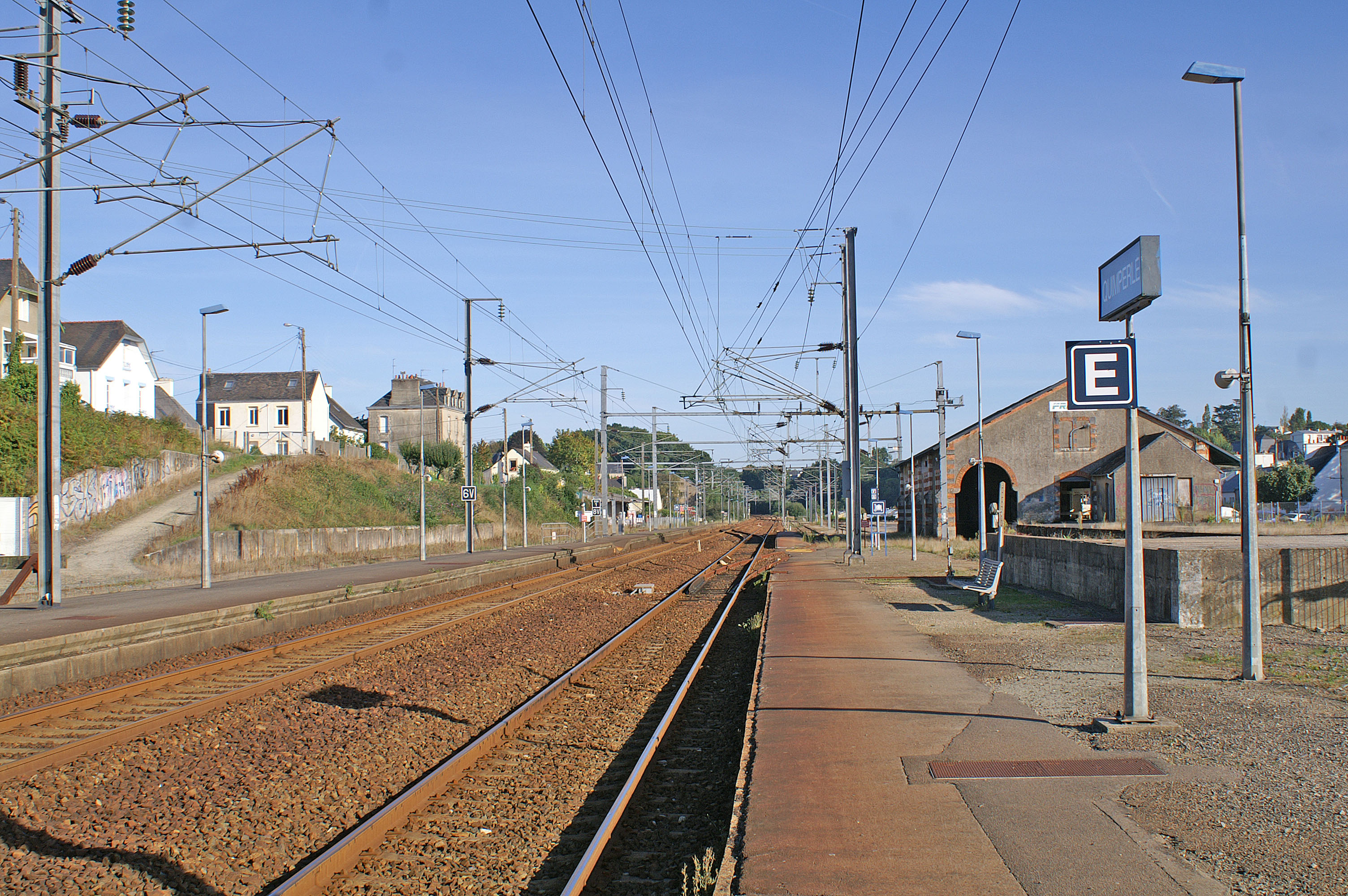 Gare de Quimperlé, les voies en direction de Quimper. On aperçoit l'ancienne halle à Marchandises.